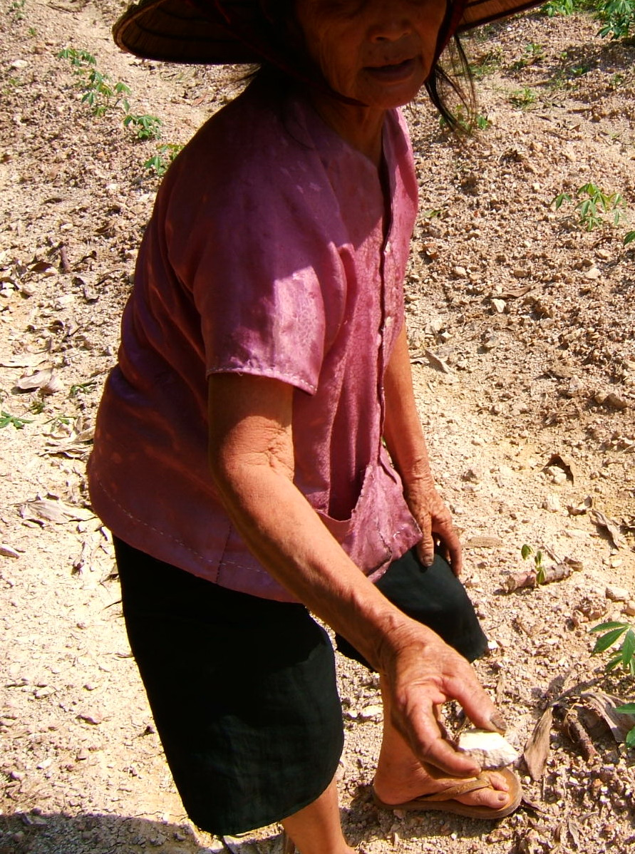 Một miếng đất sét non được lấy trên đồi sắn trong tay một bà cụ. Các miếng đất sét thường được đặt trên giàn hun khói (cây sim, cây mua đốt cháy) để trở thành một trong những đặc sản ẩm thực của huyện Lập Thạch, tỉnh Vĩnh Phúc.